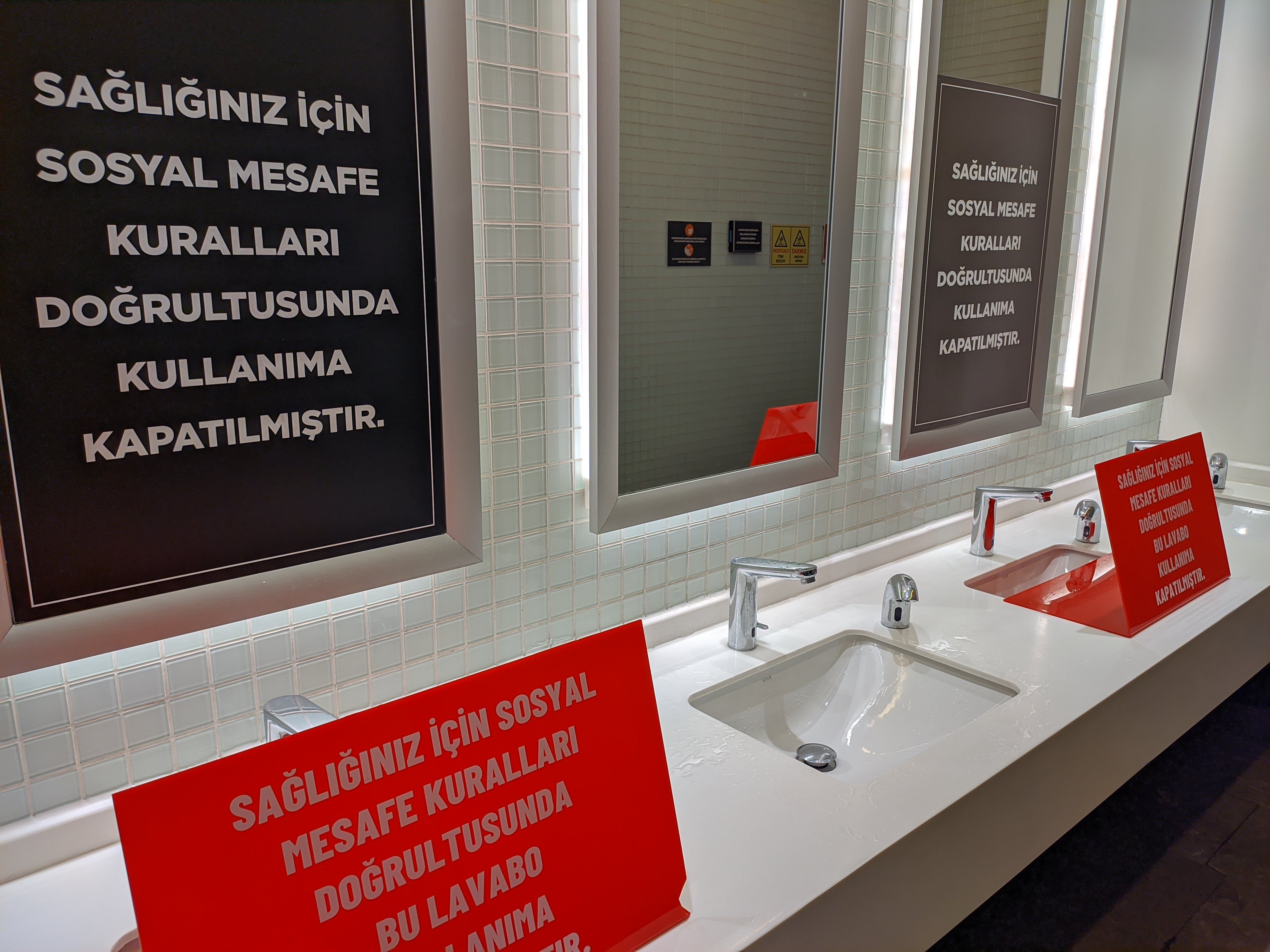 COVID-19'un risk teşkil ettiği süreçte Samsun'daki Piazza AVM'nin lavabolarına koyulan sosyal mesafe uyarıları.